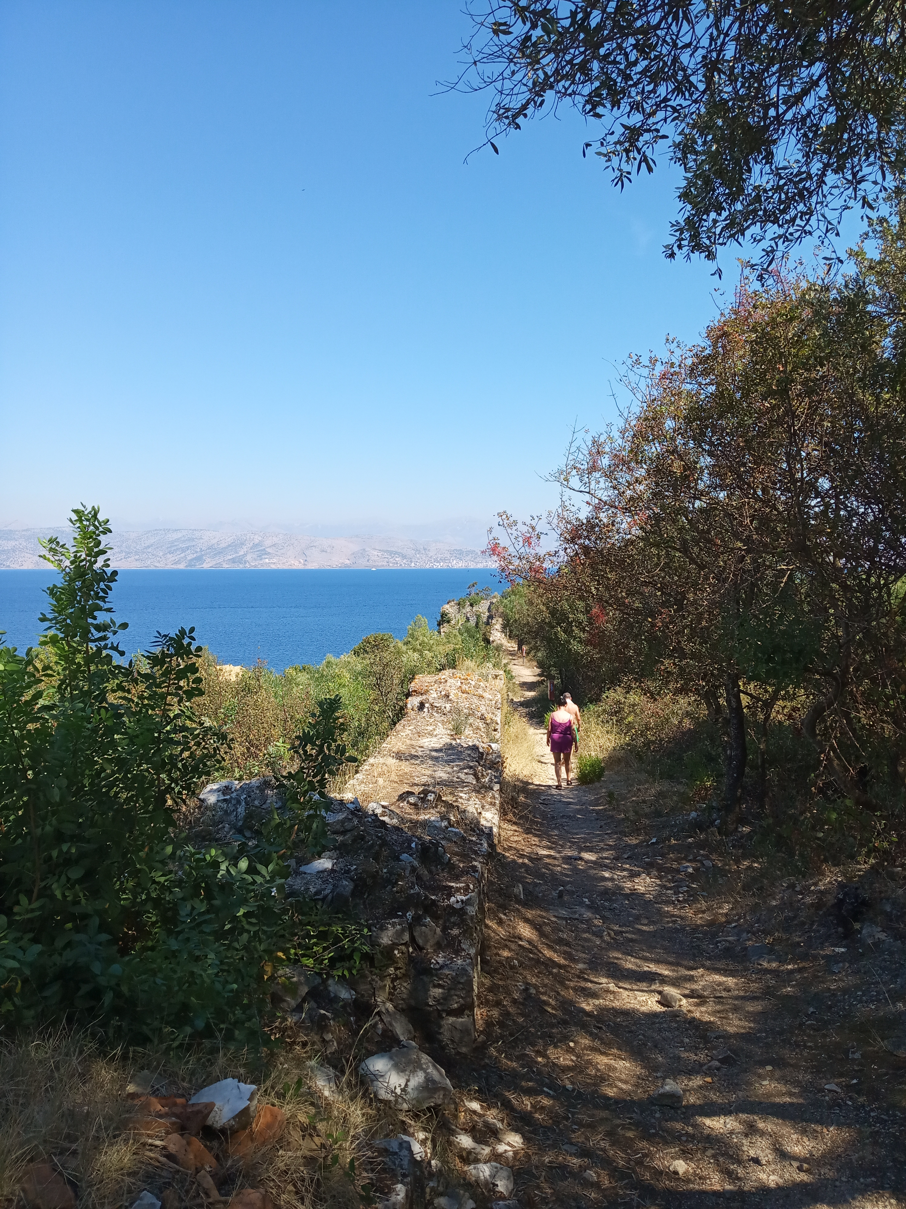 замок Кассіопі, Греція, Керкіра (Корфу)